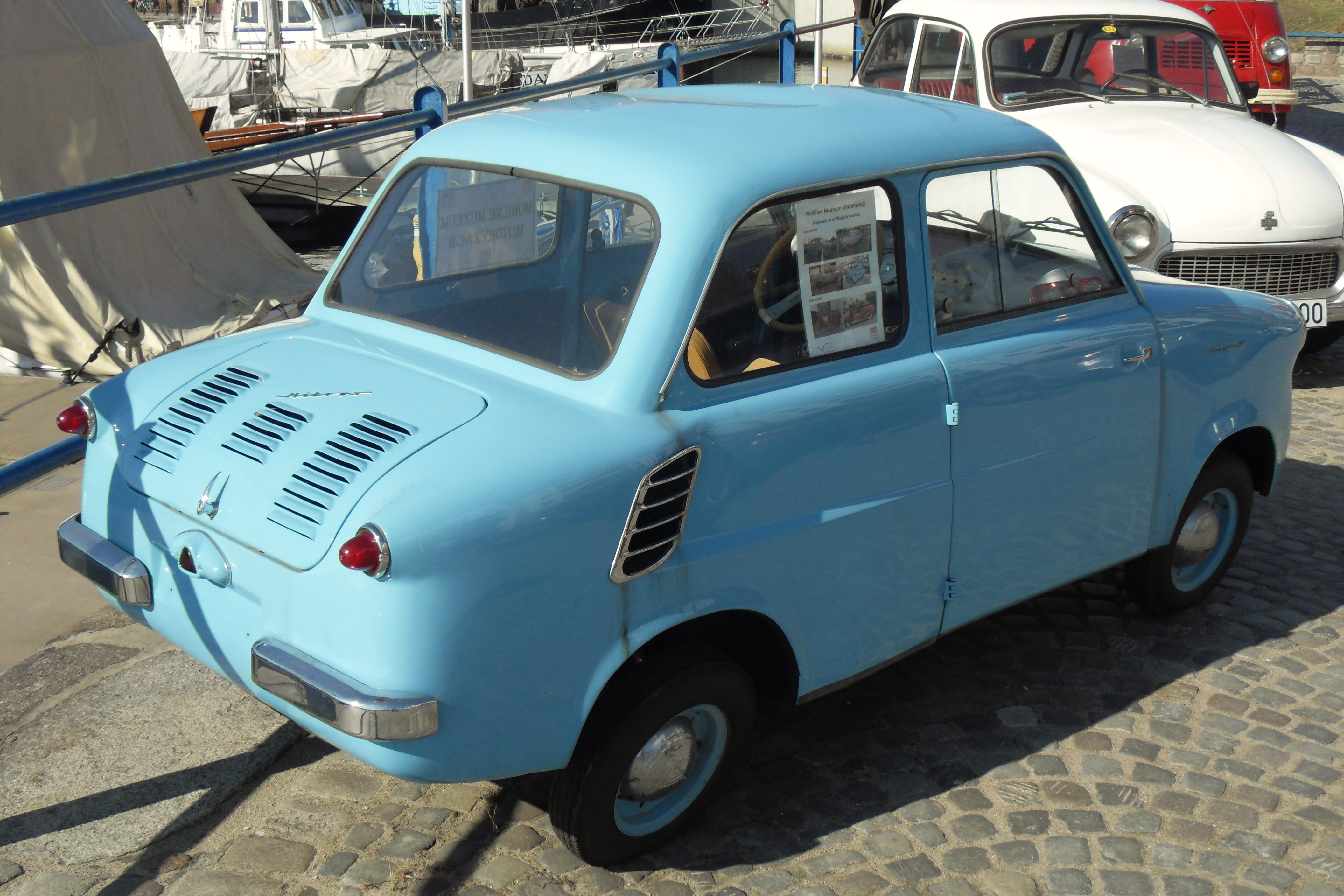 Gdańsk, ul. Szafarnia i Mikrus.